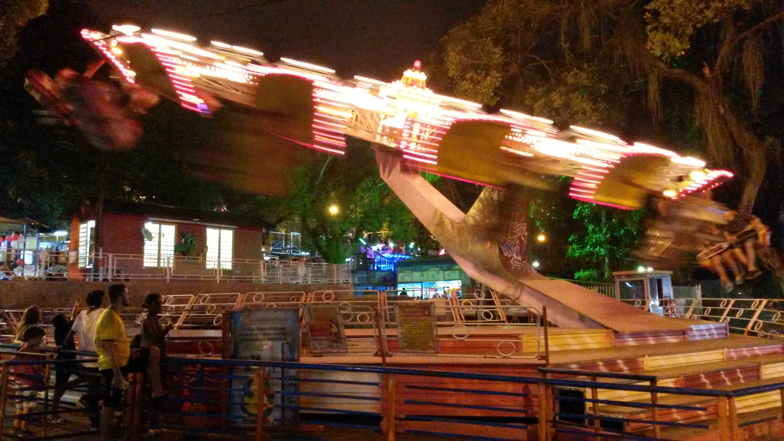 Brinquedo Sombreiro Mexicano do Parque Shanguai